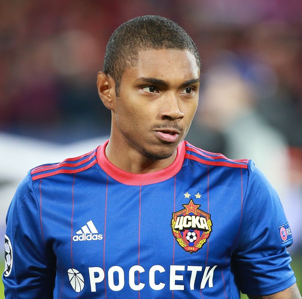 Vitinho